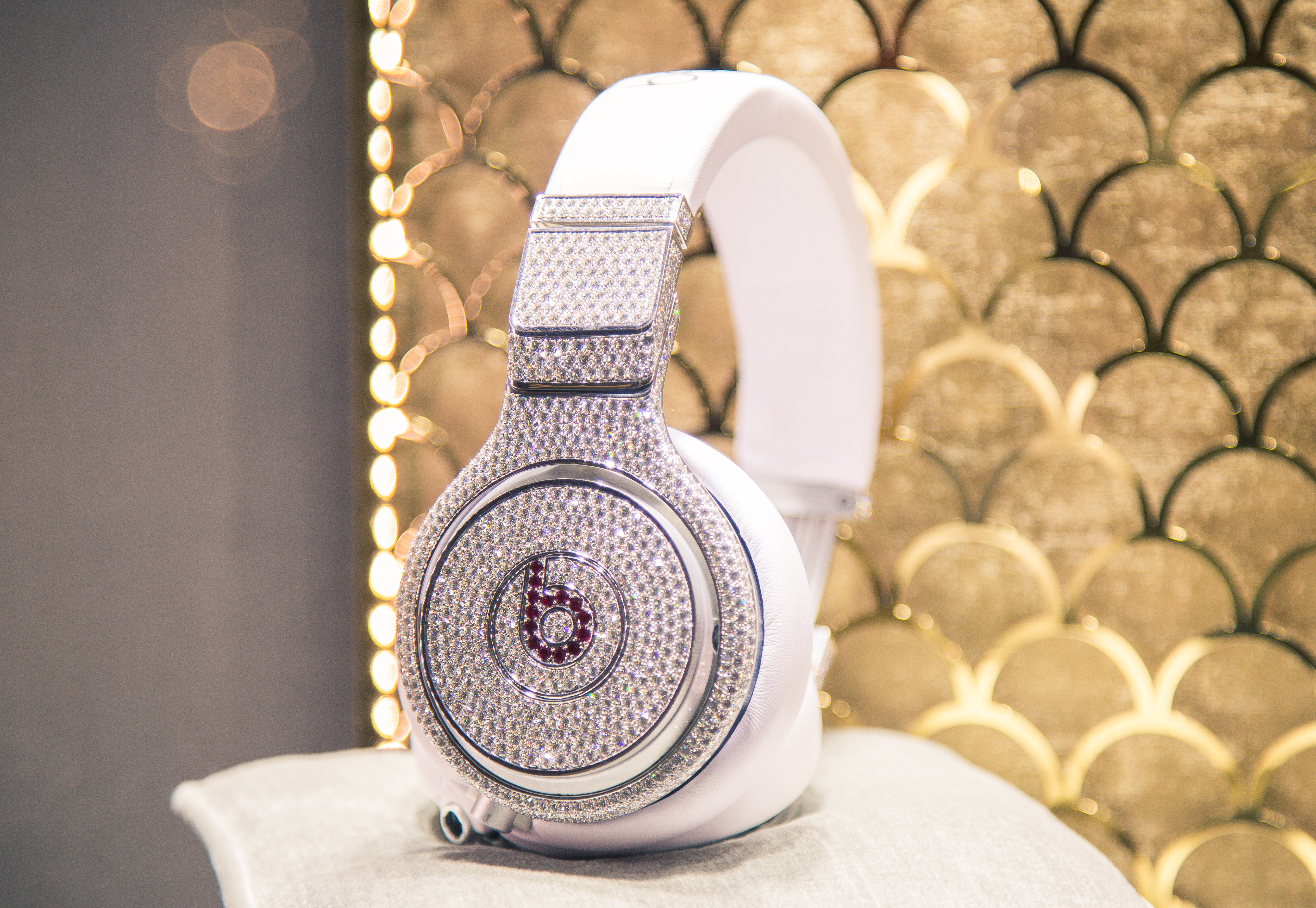 Wynn Las Vegas